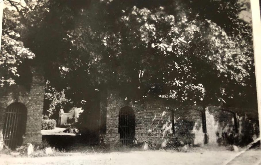 Majątek Stara Wieś. Brama wjazdowa, która znajdowała się przy trasie 92 na wysokości przejazdu PKP Sklęczki.